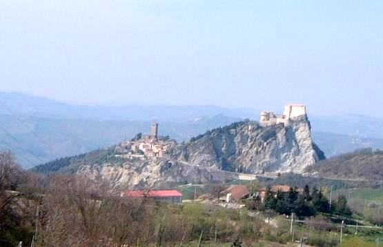 Vista di San Leo da Maiolo.